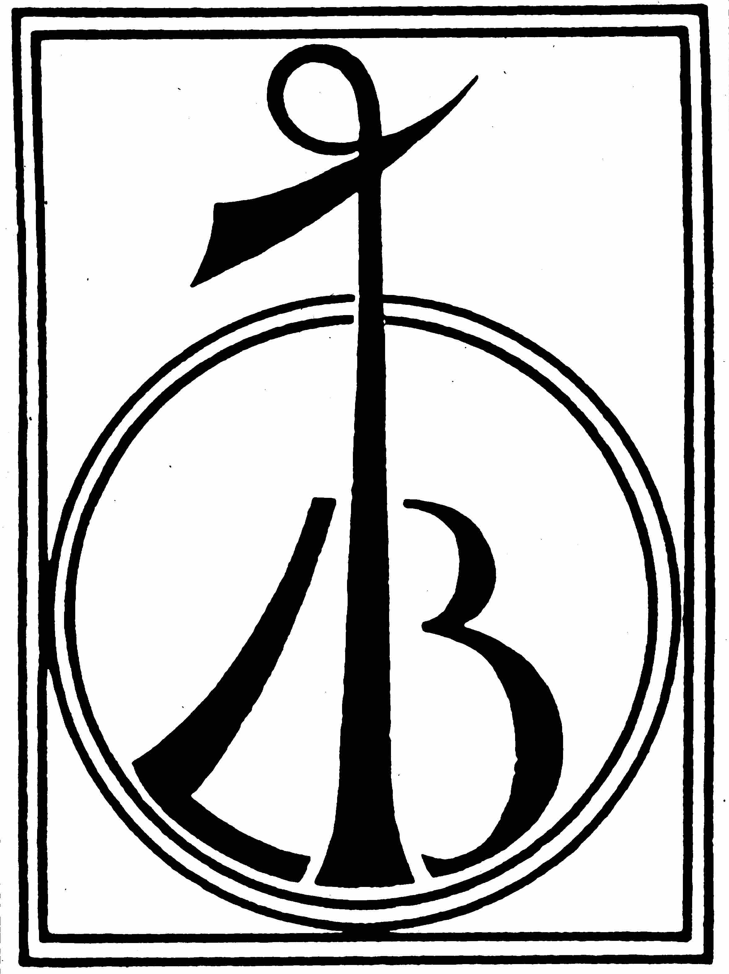 LEO BAECK INSTITUTE logo